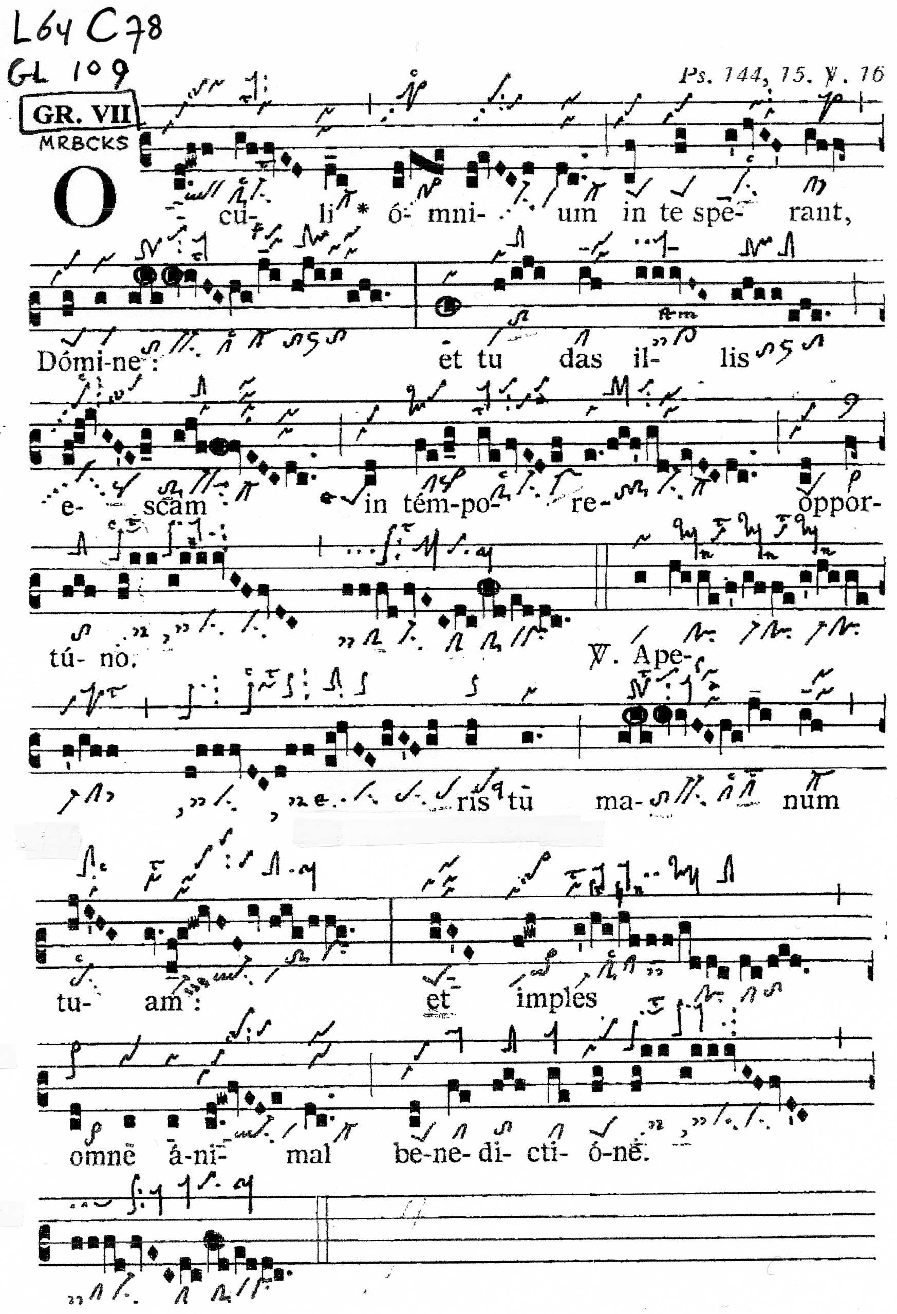 verschillende gregoriaanse notaties